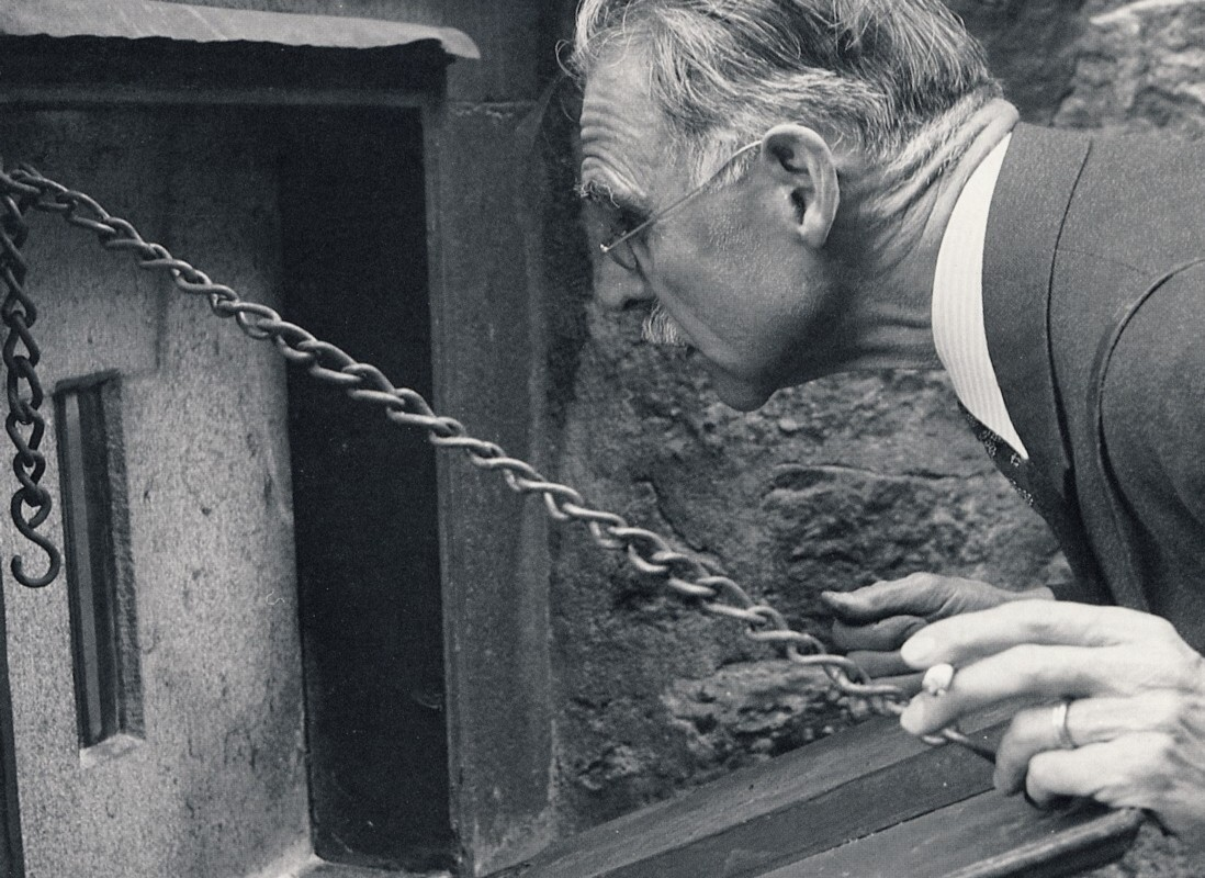 "Normalhöjdpunkt för Sverige" på Riddarholmen som avläses av kapten Olof Thufvesson från Rikets Allmänna Kartverk.